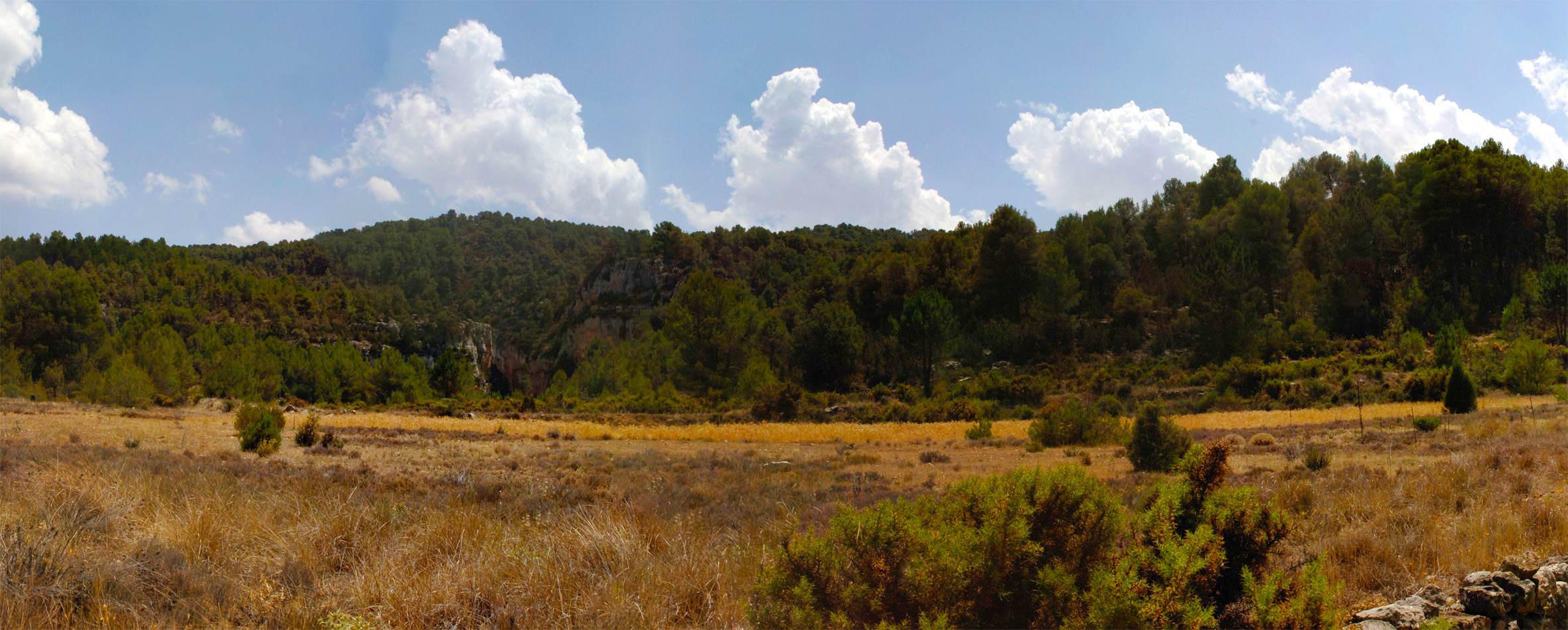 Panorámica de la llanura y el barracno donde se sitúa el Abrigo de la Quebrada